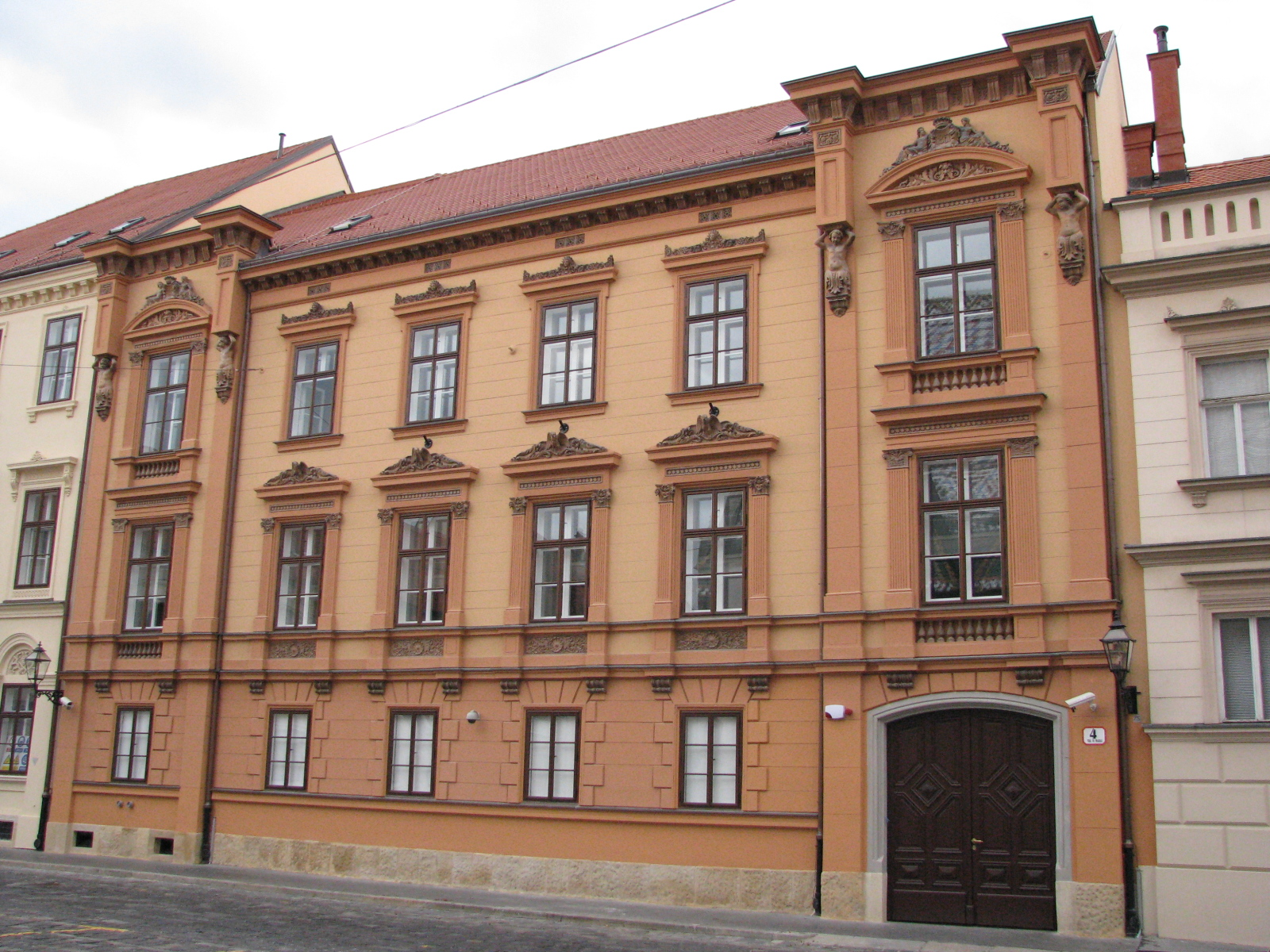 Zgrada Ustavnog suda Republike Hrvatske nakon obnove